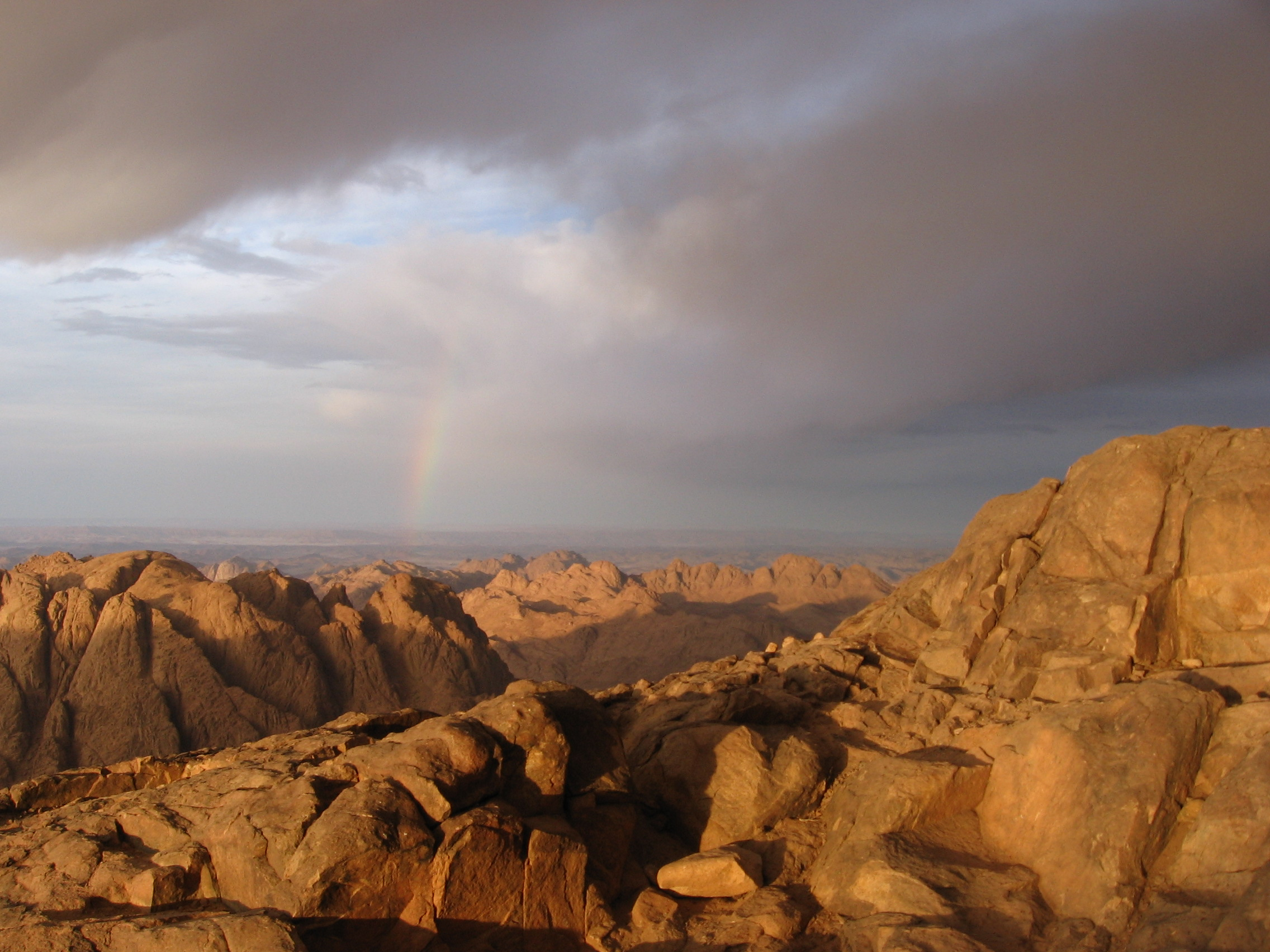 Mount Sinai (Gabal Musa)